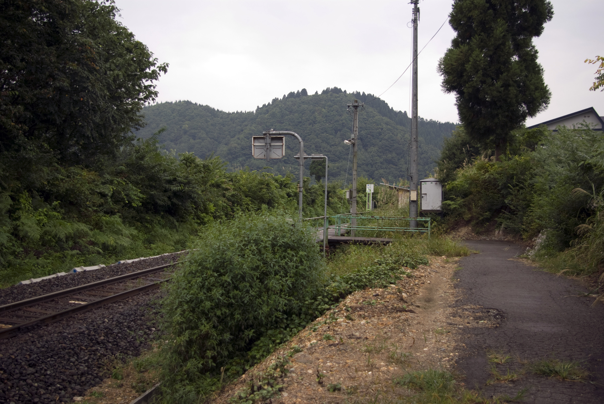 ＪＲ北上線矢美津駅